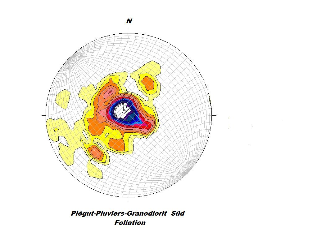 Der Piégut-Pluviers-Granodiorit besitzt Foliation. Daten aus dem Südsektor dargestellt in stereographischer Projektion.